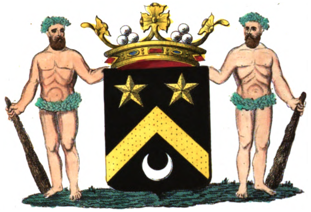 Armoiries de Radiguès de Chennevière